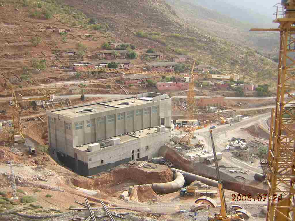 L'usine reversible N°1 de la STEP Afourer en chantier